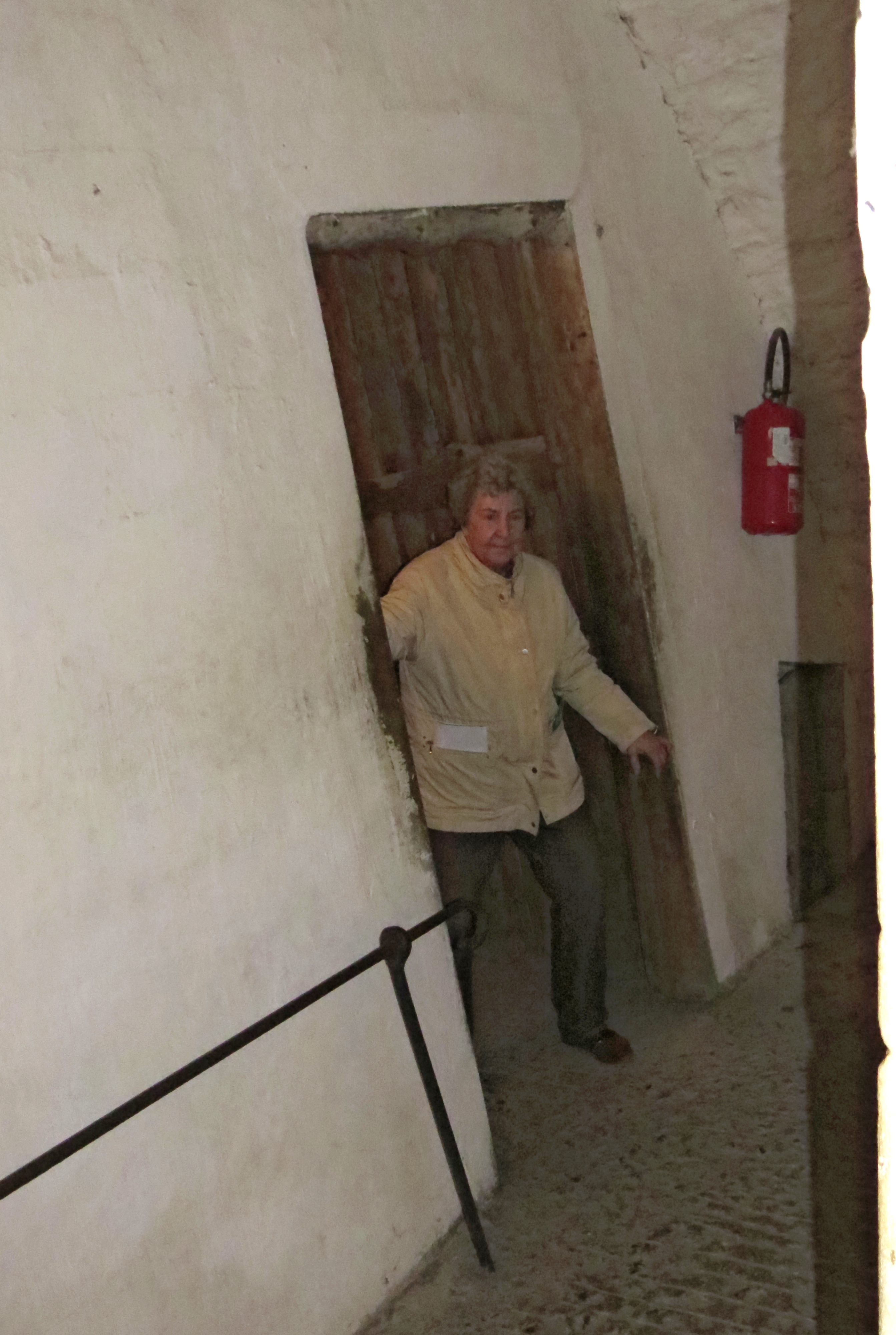 Festung Dinant: Der schiefe Bunker ist erfolgreich durchquert worden. Zur Orientierung ist eine gerade Wand auf der rechten Seite mit abgelichtet.